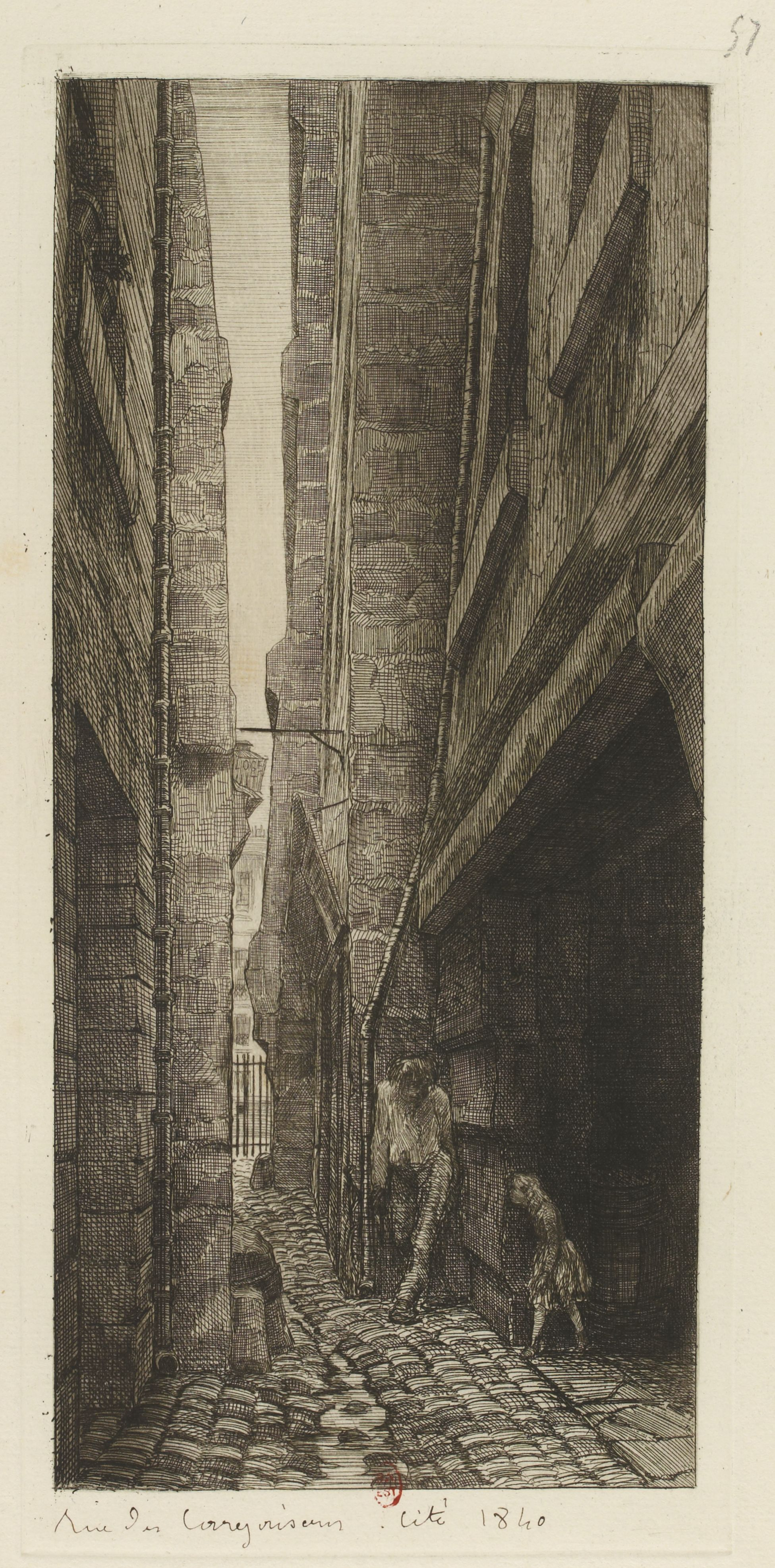 rue des Cargaisons sur l'île de la Cité ; on aperçoit en arrière plan les barrières qui fermaient la rue.